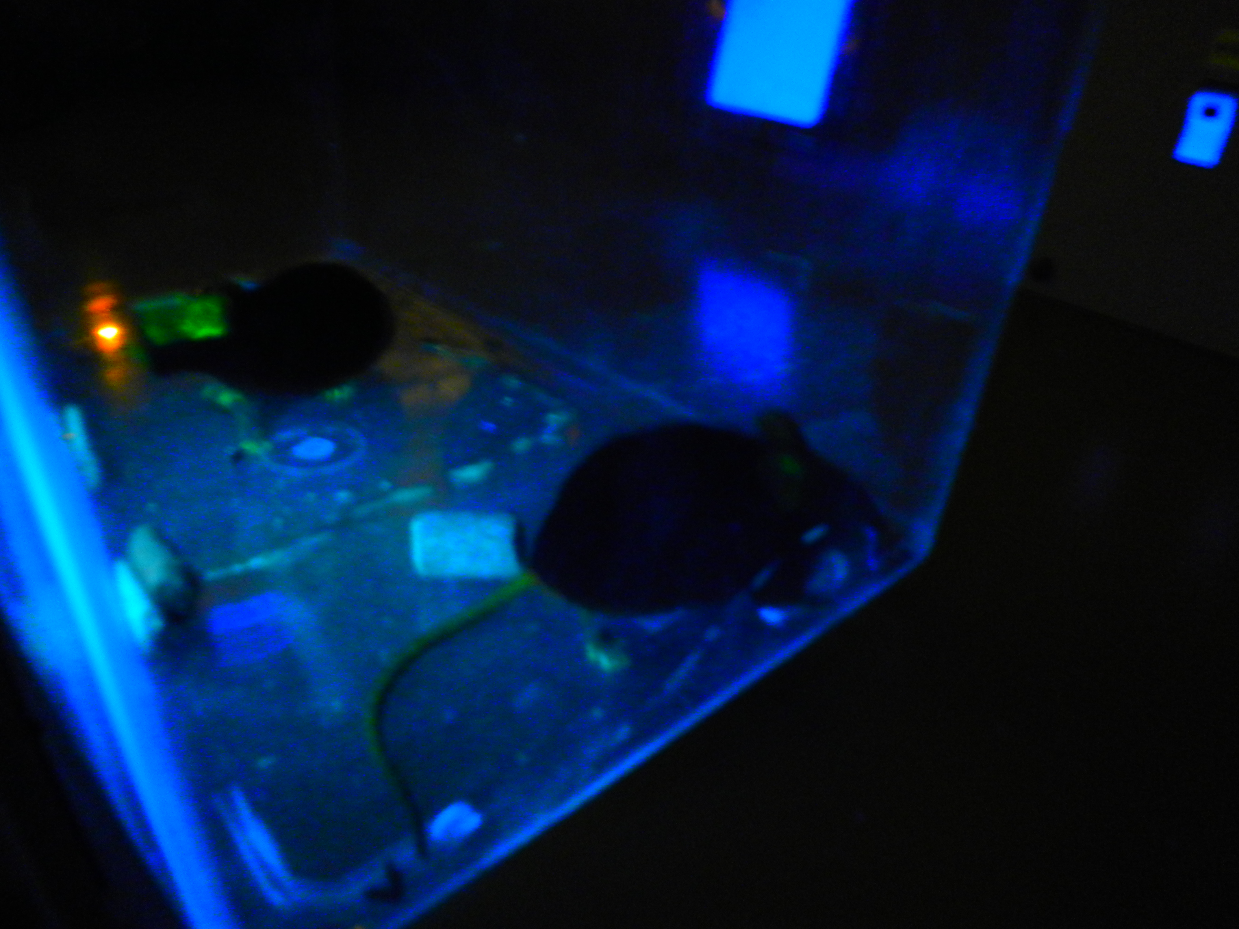 GFP蛋白で耳を標識したマウス